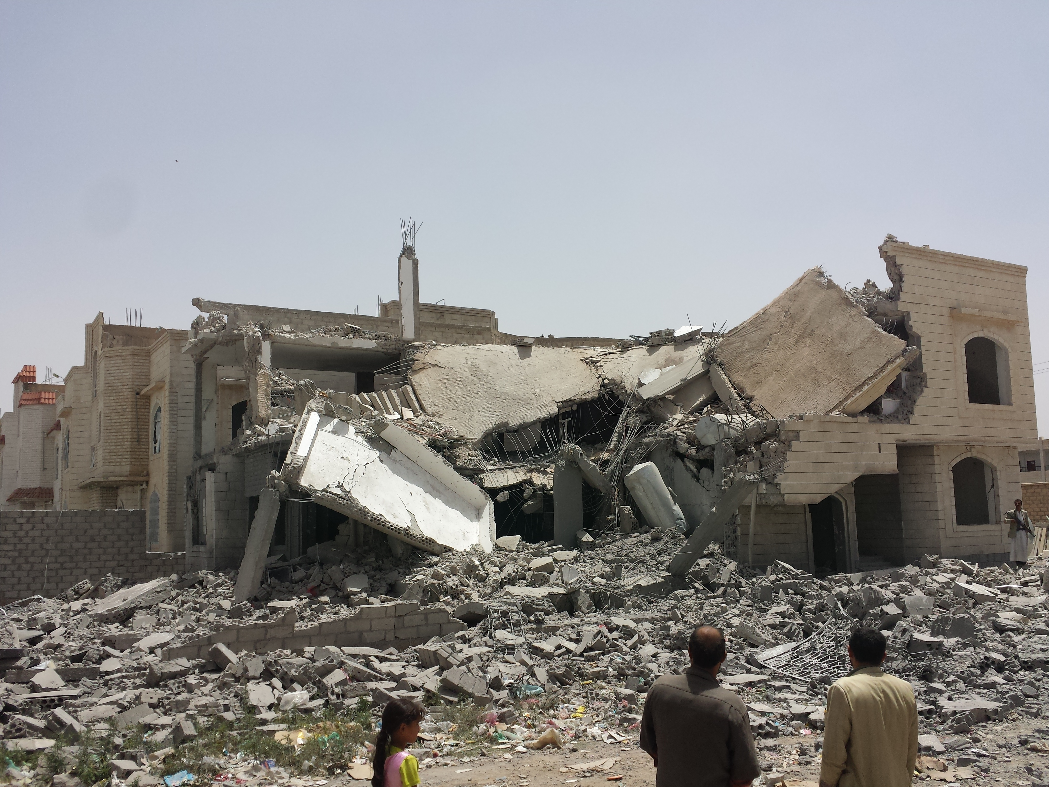 منزل مدمر نتيجة لغارات التحالف بقيادة السعودية - جنوب صنعاء